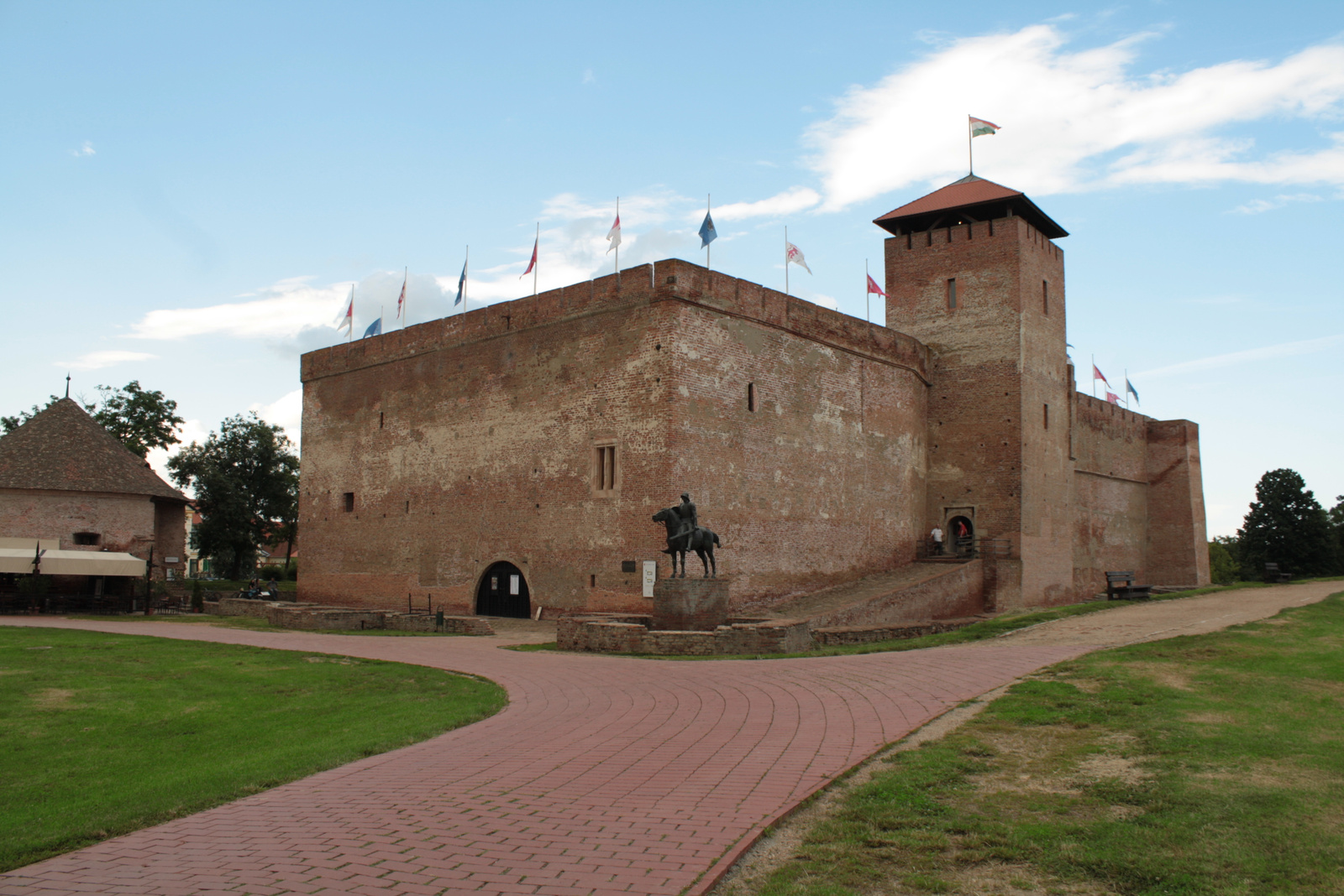 Vár (Gyula, Várfürdő út (Szigeterőd, Belső vár)) This is a photo of a monument in Hungary. Identifier: 2485